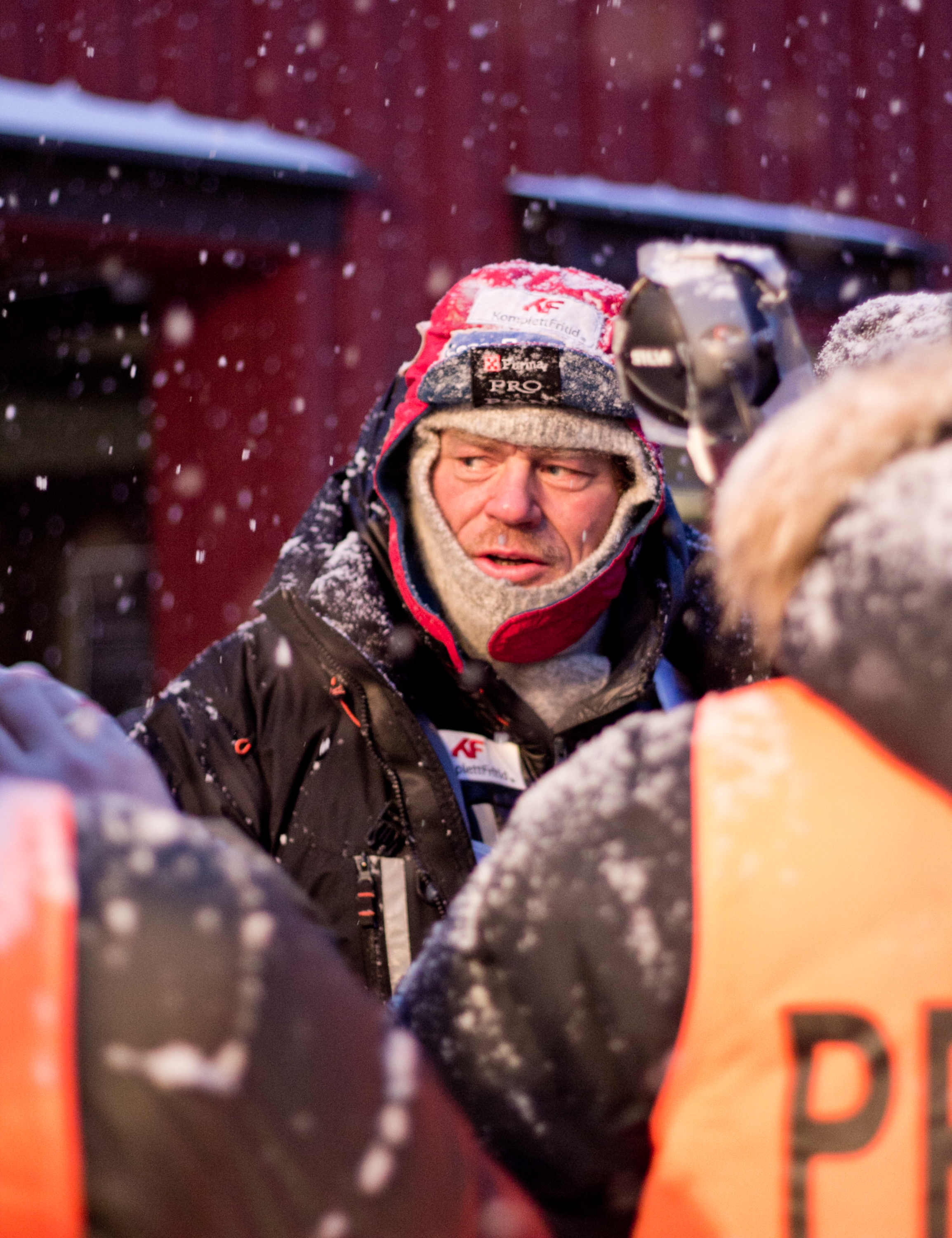 Hanne Nordskag